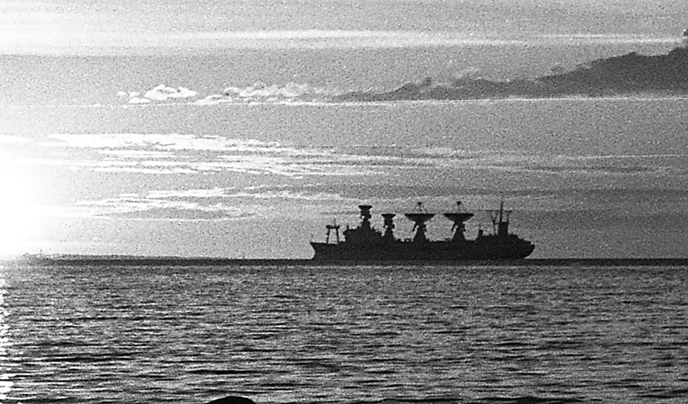 «Kosmonaut Juri Gagarin» Merekosmoselaevastiku lipulaev Tallinna reidil 1971